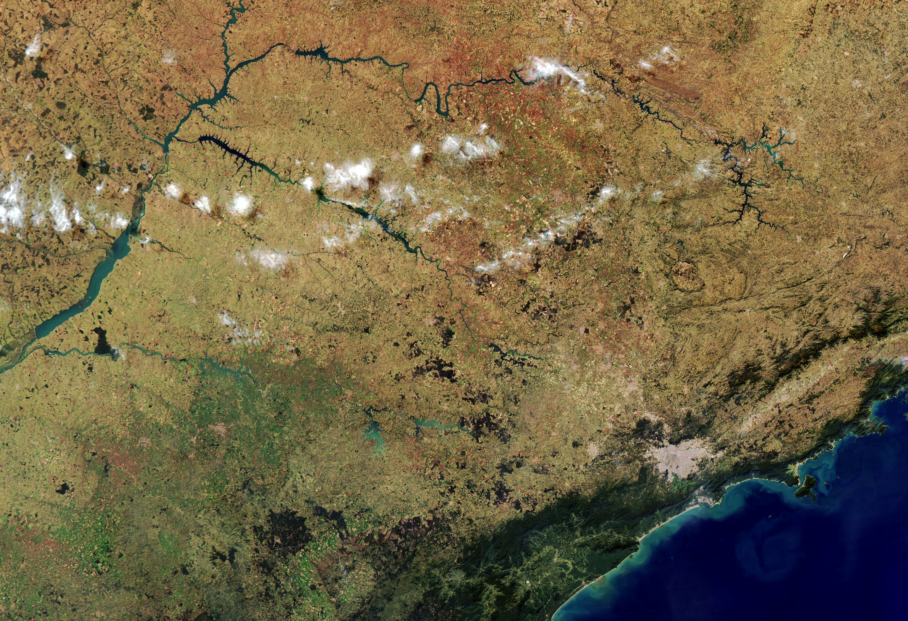 Megalopolis Rio-São Paulo